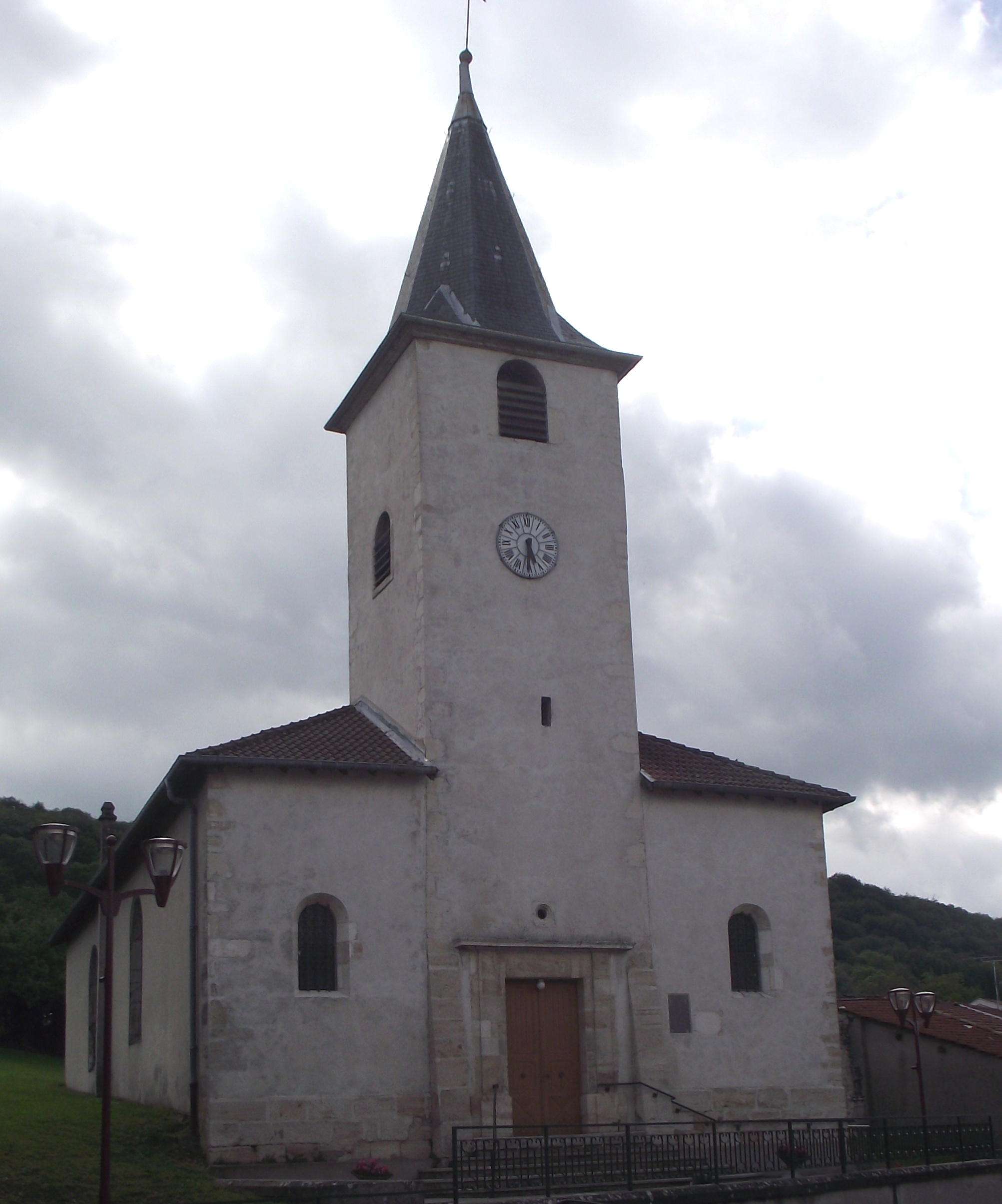 église de la commune de Mont-le-Vignoble (54).